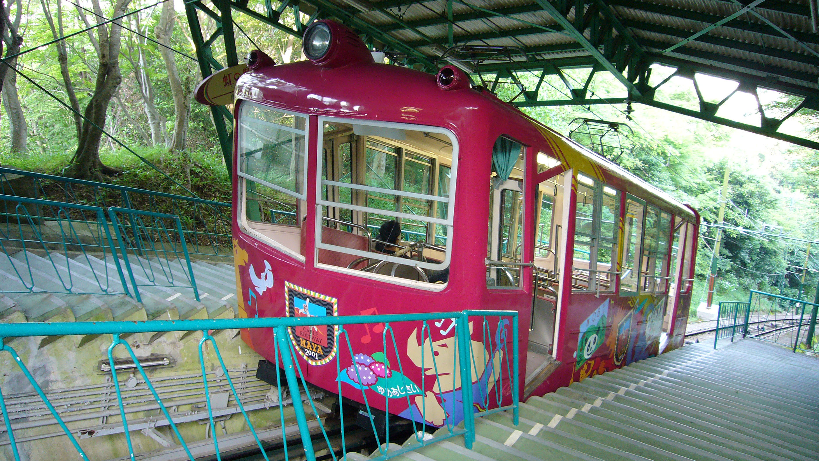 Maya Cablecar in Kobe, Japan